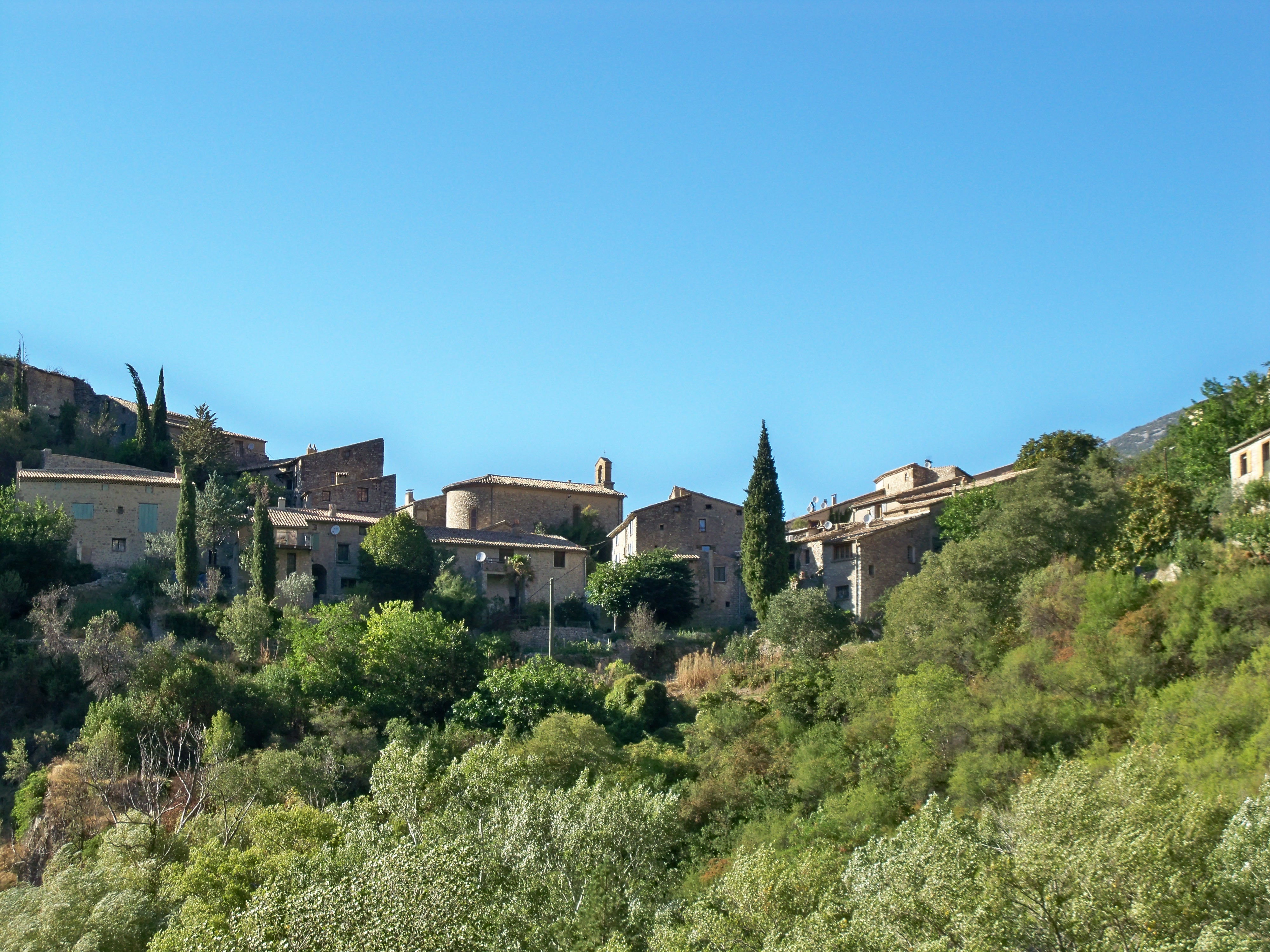 Village de Saint May (26)